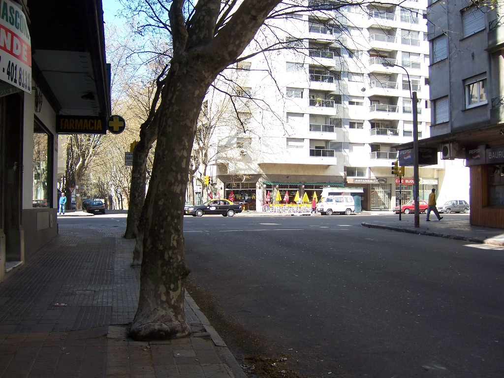 Vista de la intersección de la Avenida 18 de Julio y la calle Dr. Juan Paullier, Barrio Cordón, Montevideo, Uruguay. La imagen se orienta según Paullier en sentido sur.